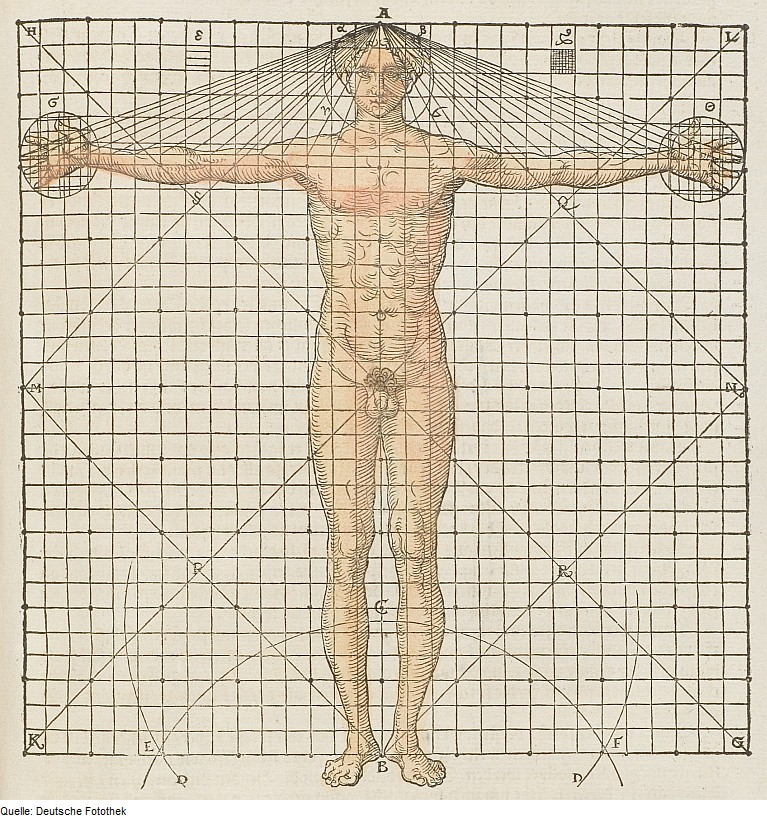 Original image description from the Deutsche Fotothek Architektur & Proportion & Figur